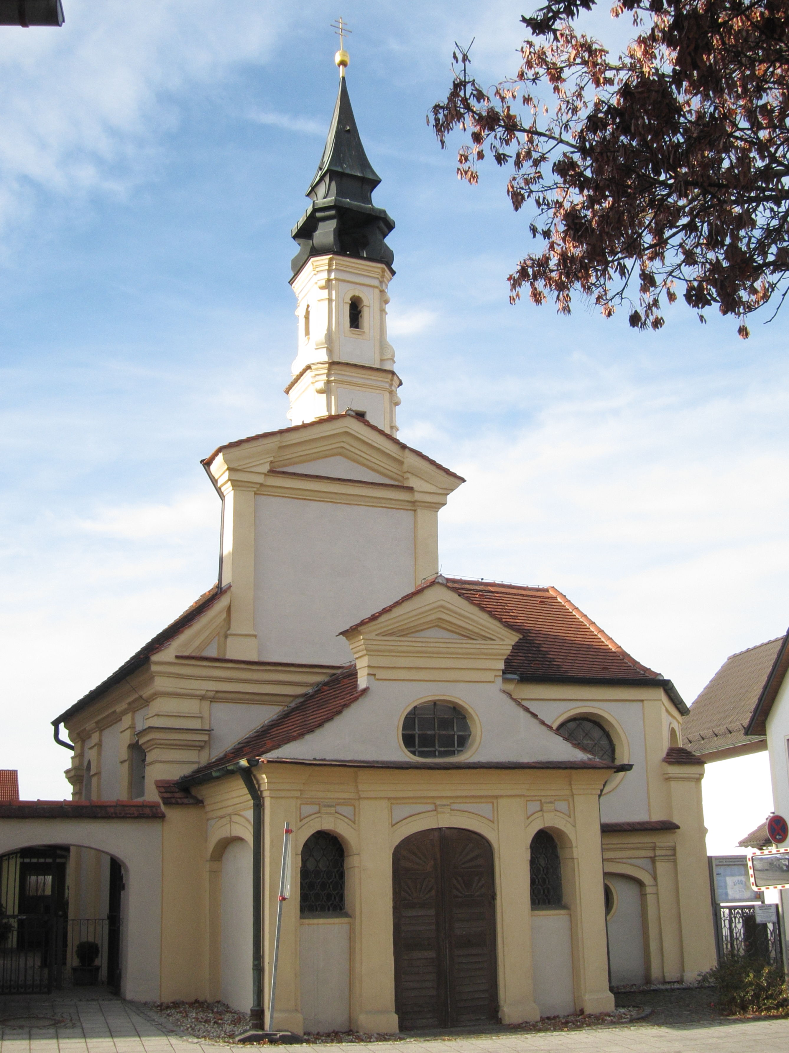 Högerstraße 24; sog. Högerkapelle; ehem. Schloßkapelle, origineller Barockbau mit Heiliger Stiege und Hoegergruft, 1669; mit Ausstattung.